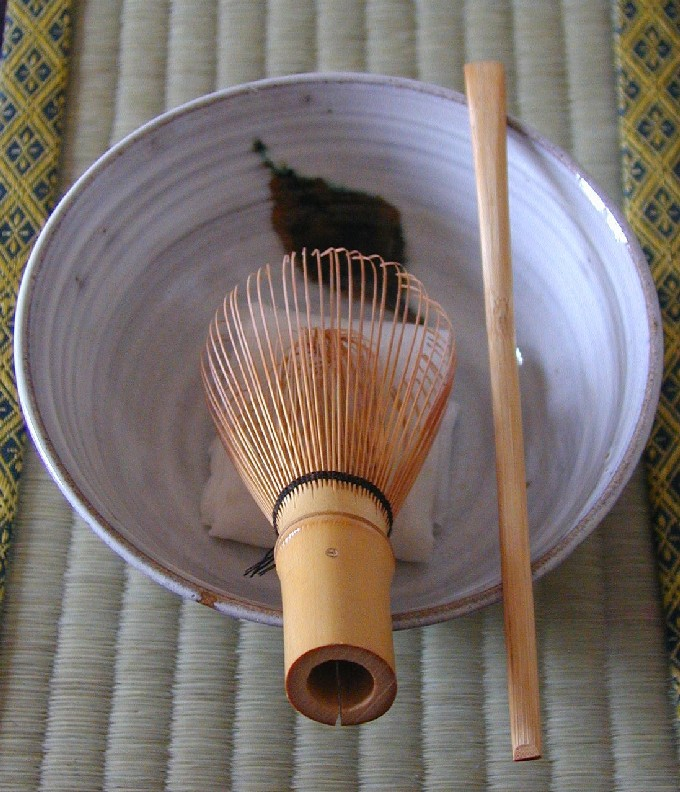 Foto scattata da me il 25 luglio 2004, rappresenta gli utensili della Cha no yu in posizione di "apertura" cioè come vengono portati all'inizio della cerimonia: la tazza (chawan), in questo caso una ceramica Kasamayaki, sul fondo della quale è deposta la chakin, piccolo rettangolo di lino, piegato in maniera particolare, il chasen, frullino di bambù, il chashaku, cucchiaino di bambù.